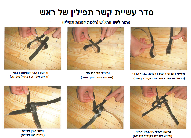 עשיית הקשר מרובע בשש שלבים